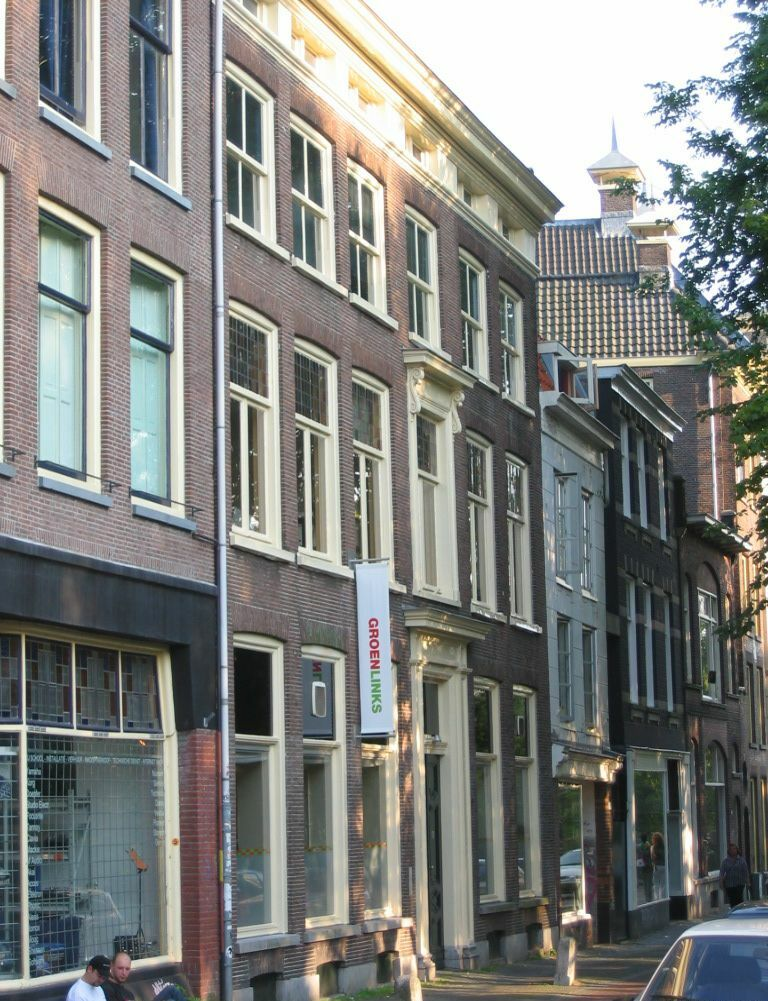 Pand van GroenLinks in Utrecht